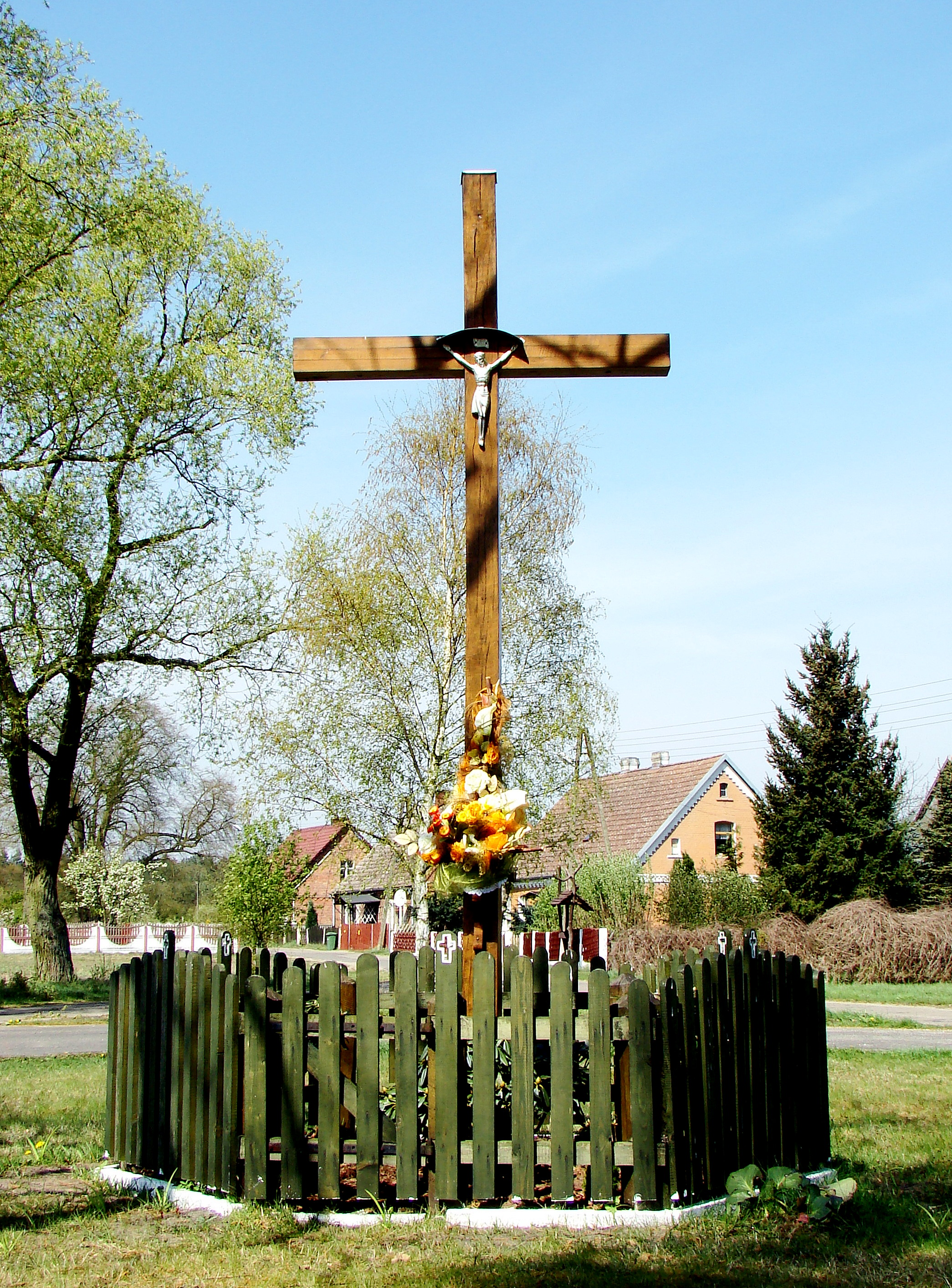 Drogoradz, przydrożny krzyż we wsi, (Gmina Police, Powiat policki, Województwo zachodniopomorskie), Polska